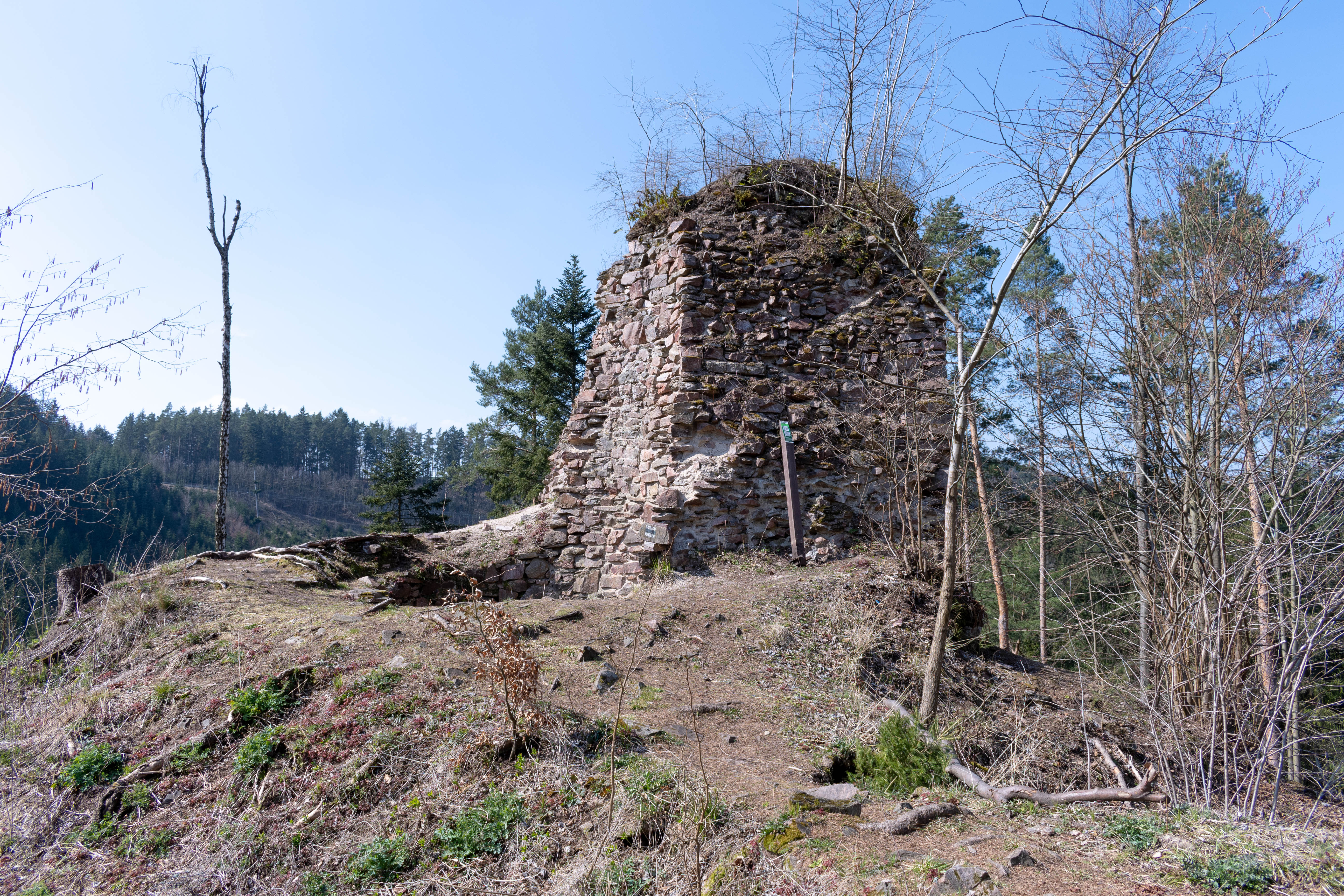 Zřícenina hradu Aueršperk – torzo věže